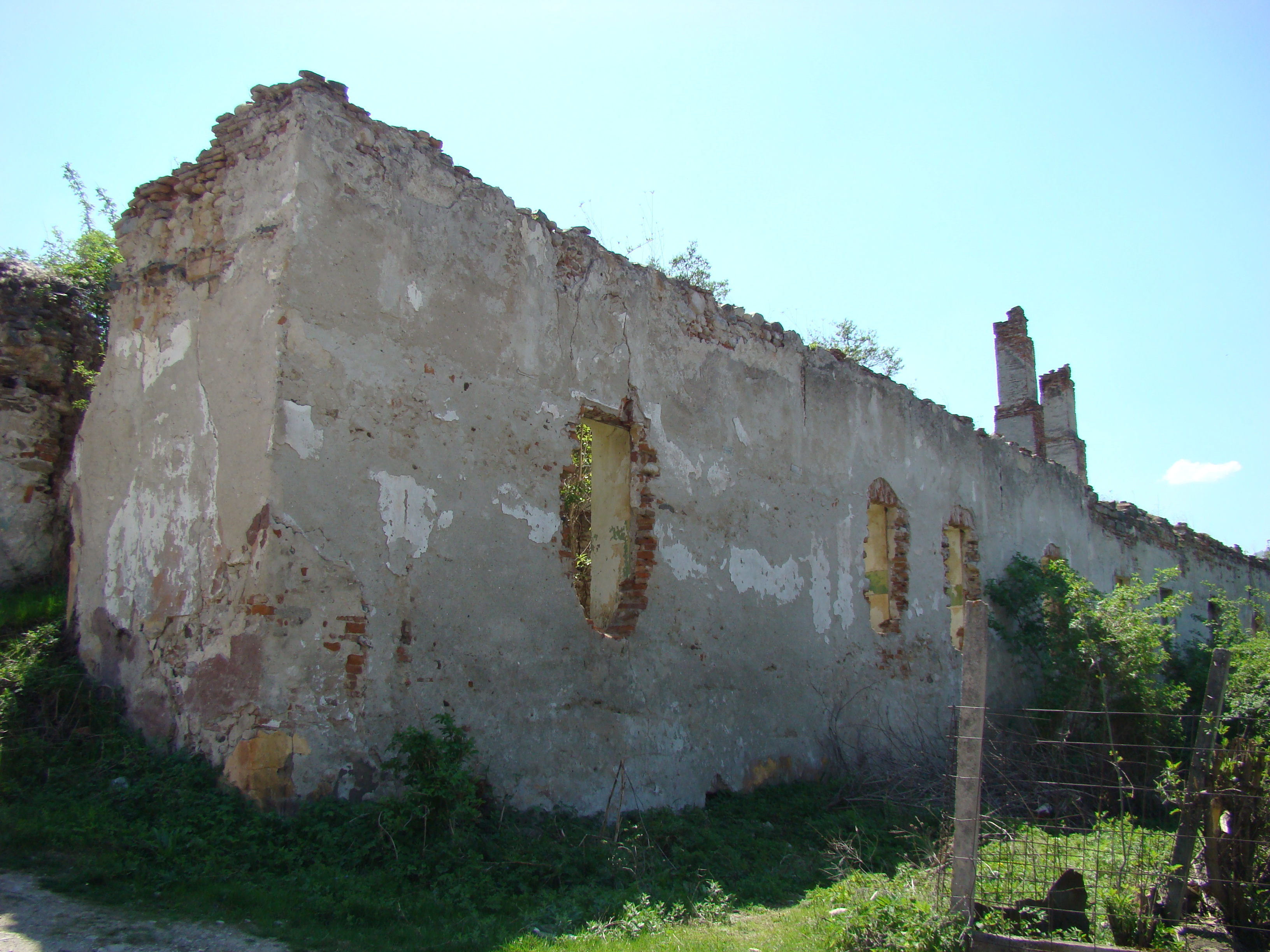 Curtea nobiliară a Cândeştilor, sat RÂU DE MORI; comuna RÂU DE MORI